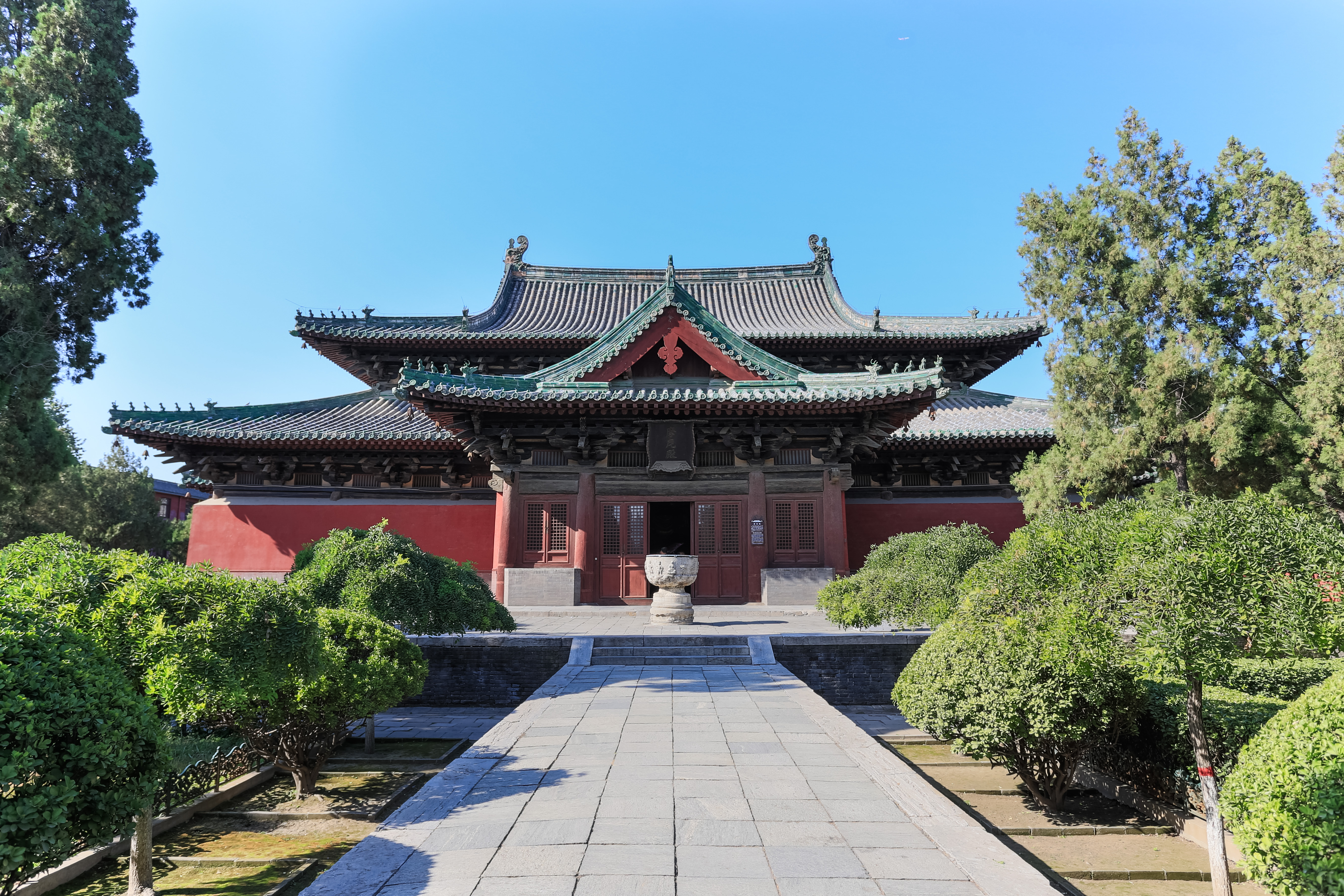 正定隆兴寺 摩尼殿